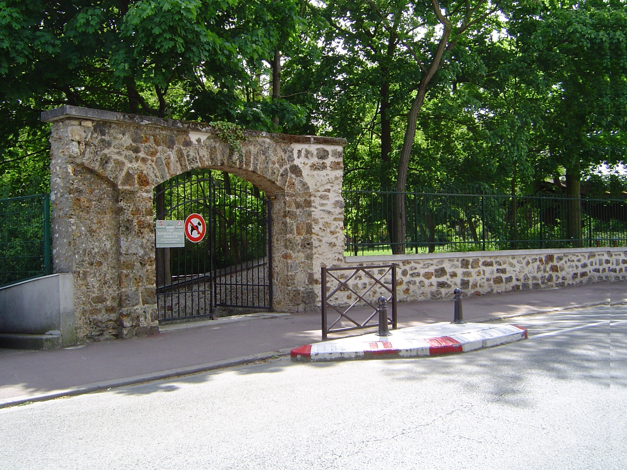 parc R. Sibille